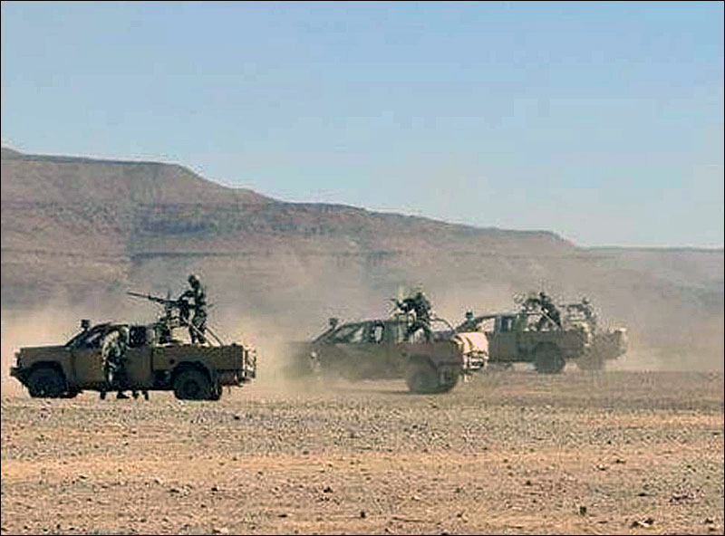 [Jemal Oumar] Recent clashes between Mauritanian troops and al-Qaeda highlight the increased risk of terrorism. المواجهات الأخيرة بين القوات المسلحة الموريتانية وتنظيم القاعدة تؤشر إلى تصاعد مخاطر الإرهاب. Les affrontements récents entre les troupes mauritaniennes et Al Qaida soulignent le risque accru posé par le terrorisme dans le pays.